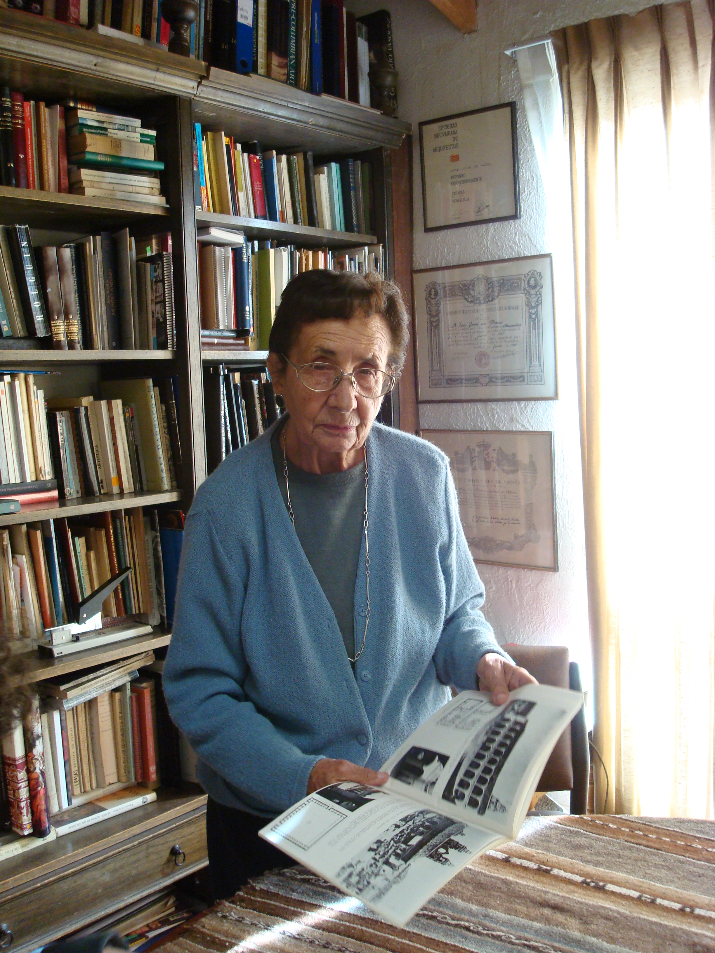 Teresa Gisbert durante una entrevista en la biblioteca de su residencia.